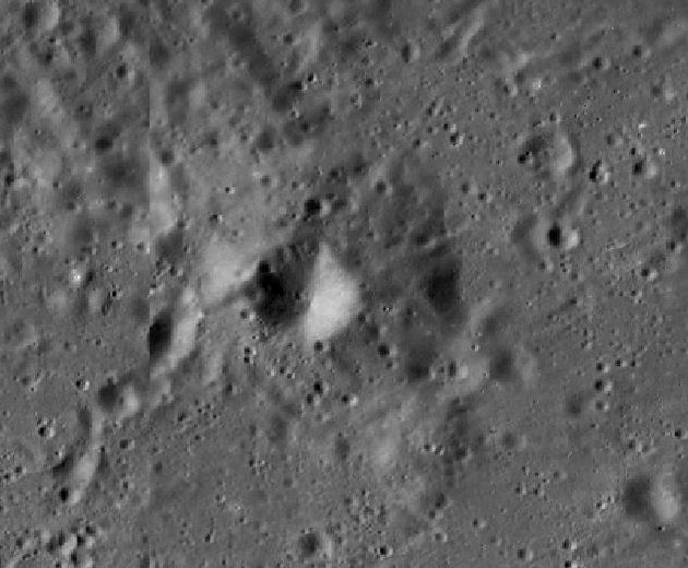 Cráter lunar Regiomontanus A. (Imagen LRO)